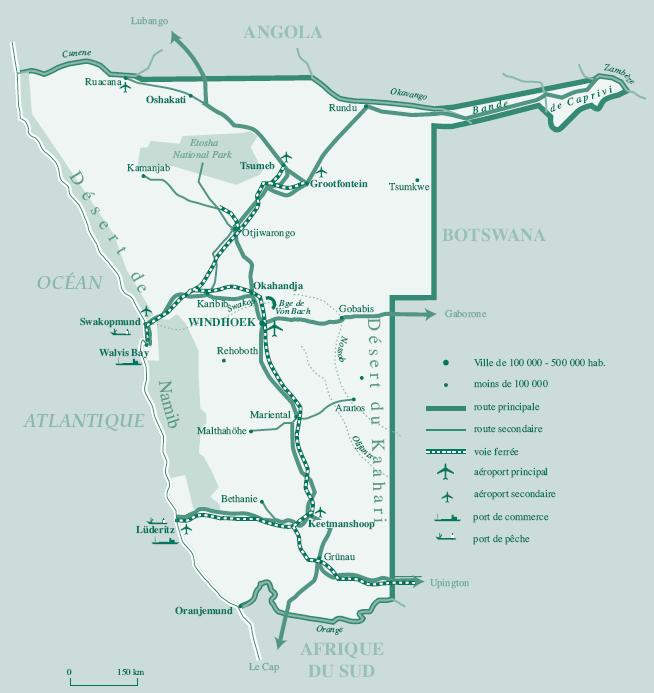 Infrastructure de la namibie